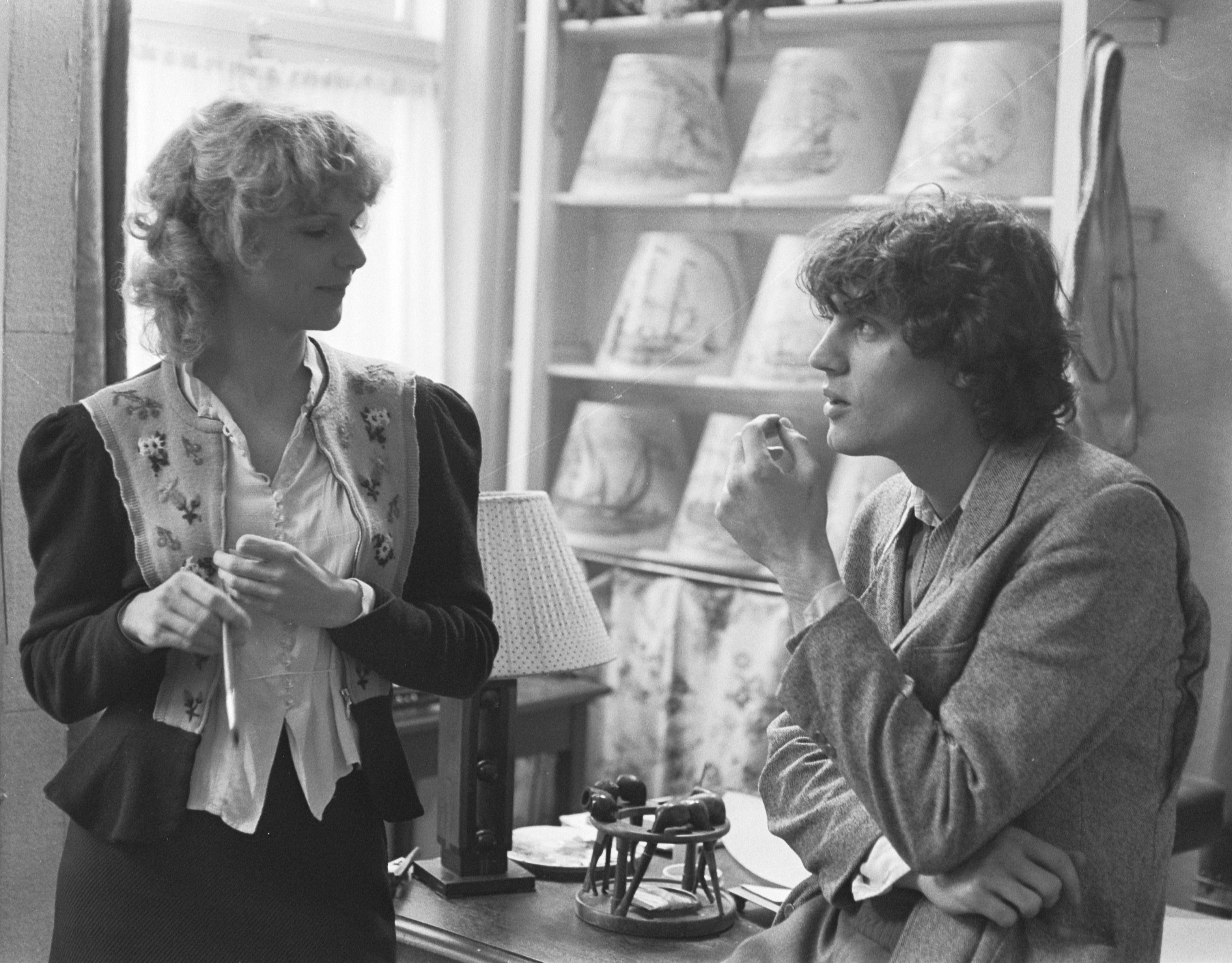 Filmopnamen voor de film "Kort Amerikaans" in Leiden. Derek de Lint (in de rol van Erik van Poelgeest ) en Tingue Dongelmans (in de rol van Ellie)